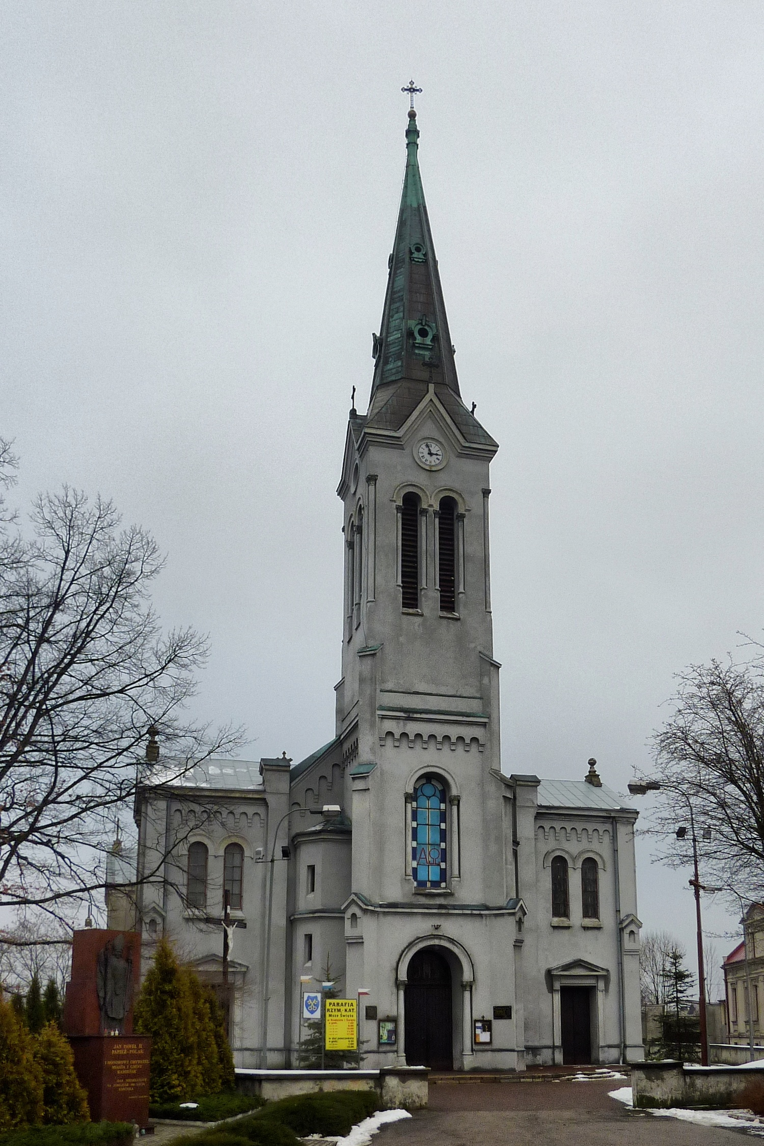 Kościół Świętych Apostołów Piotra i Pawła w Kamieńsku